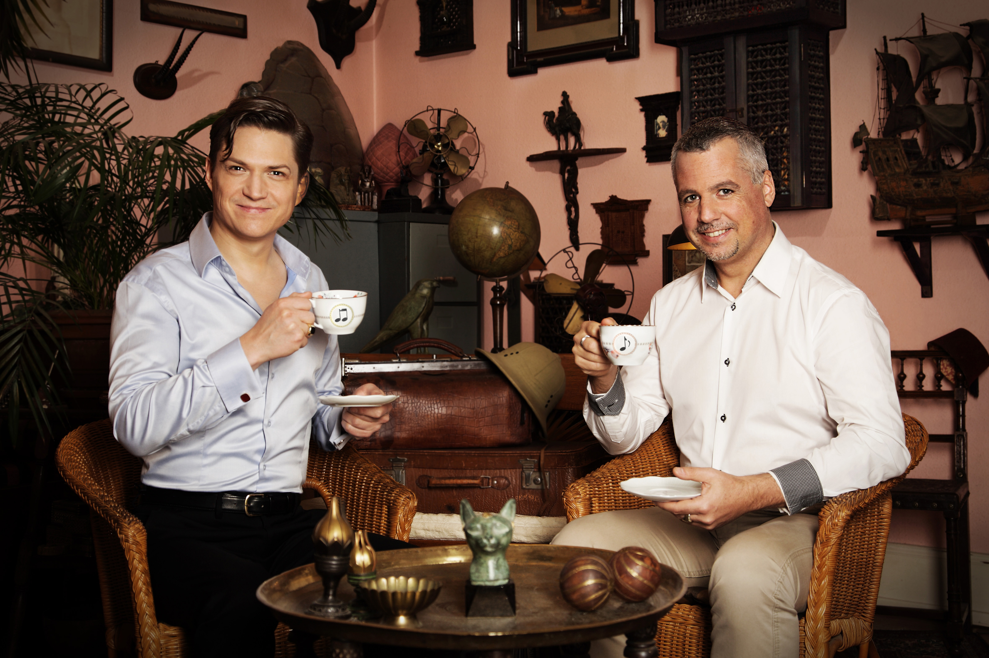 Filmkomponisten Rasmus Borowski (links) und Alexius Tschallener (rechts)